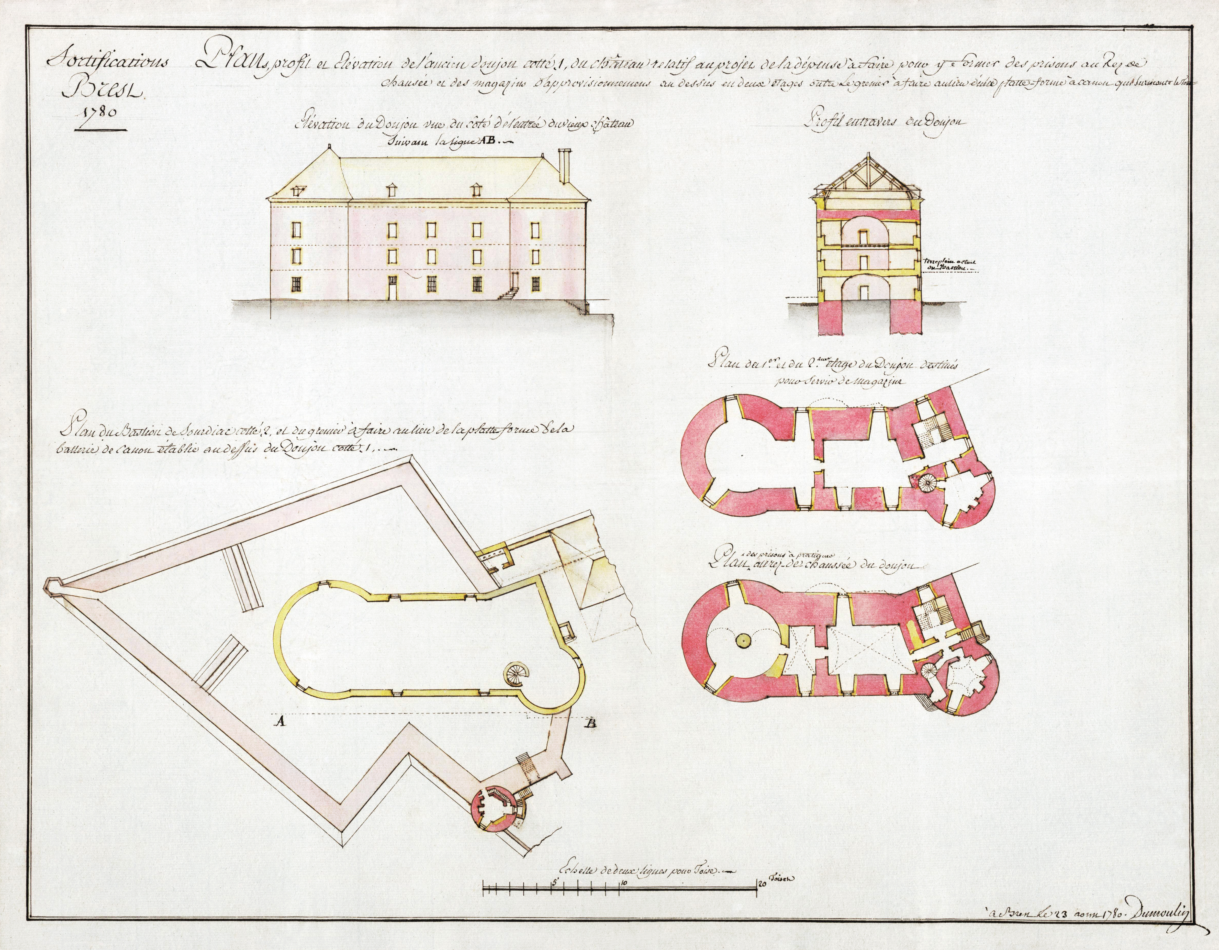 Château de Brest, Donjon et bastion de Sourdéac, transformation du donjon en prison et magasins.